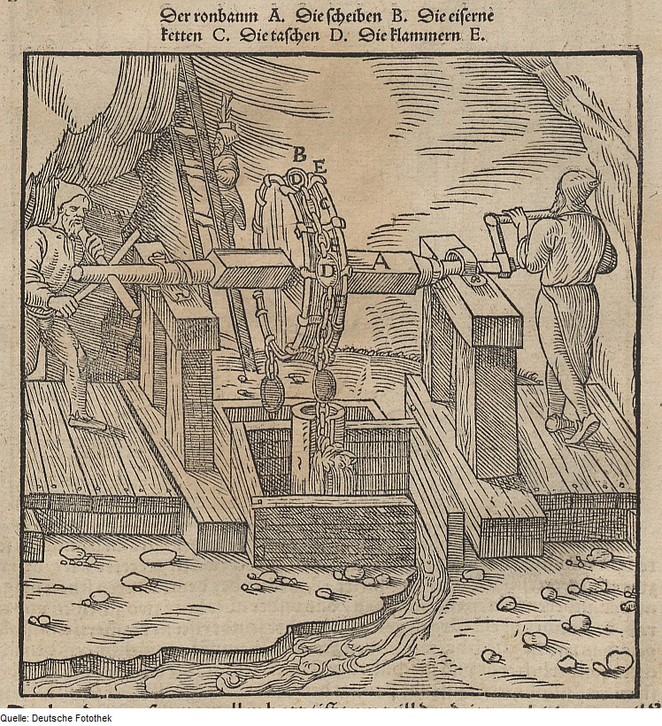 Original image description from the Deutsche Fotothek Bergwerk & Bergbau & Haspel & Rundbaum